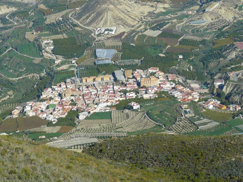 Huécija (Almería-España) vista desde el cerro la Cruz